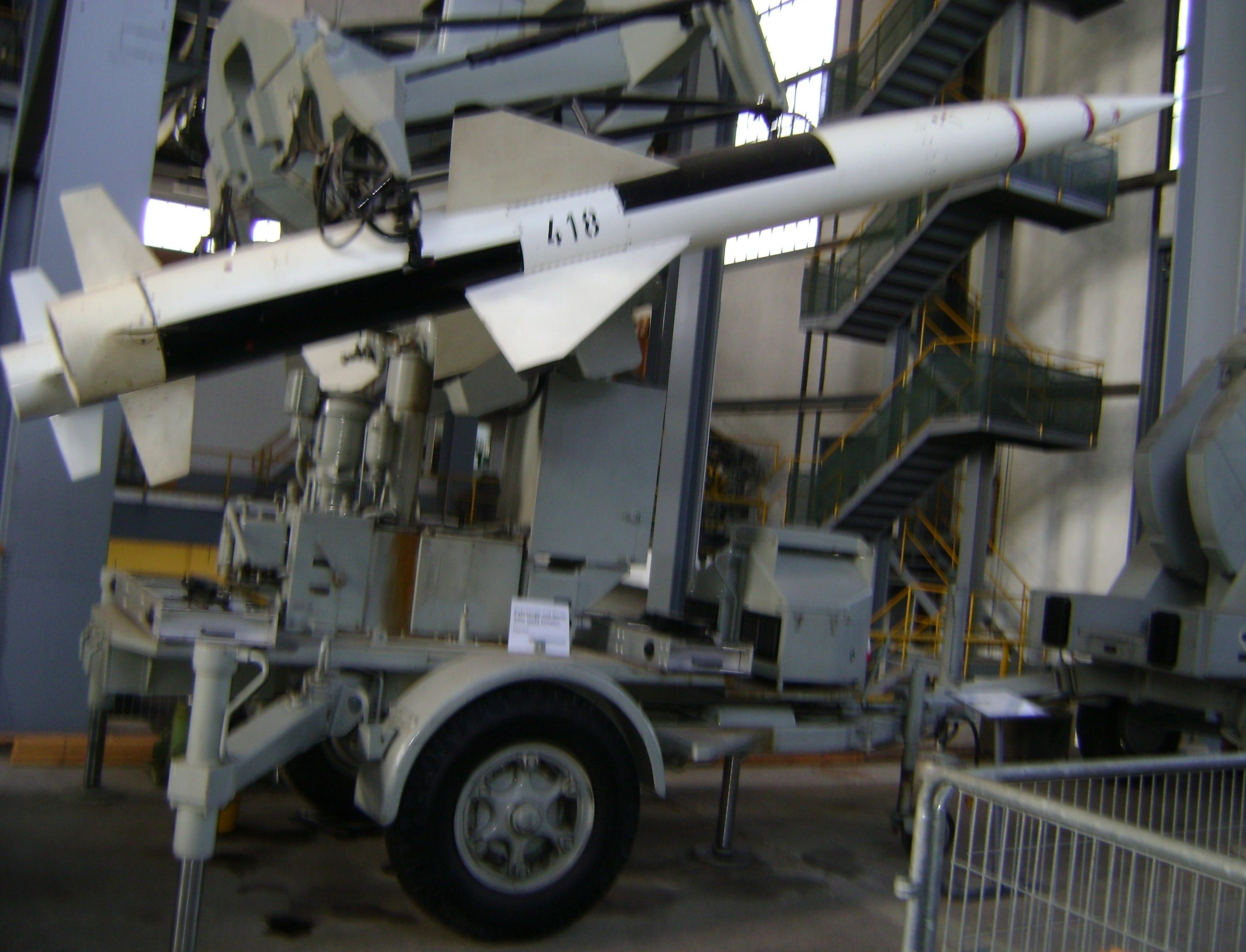 Lenkwaffensystem RSC/D Doppelstartlafette seite